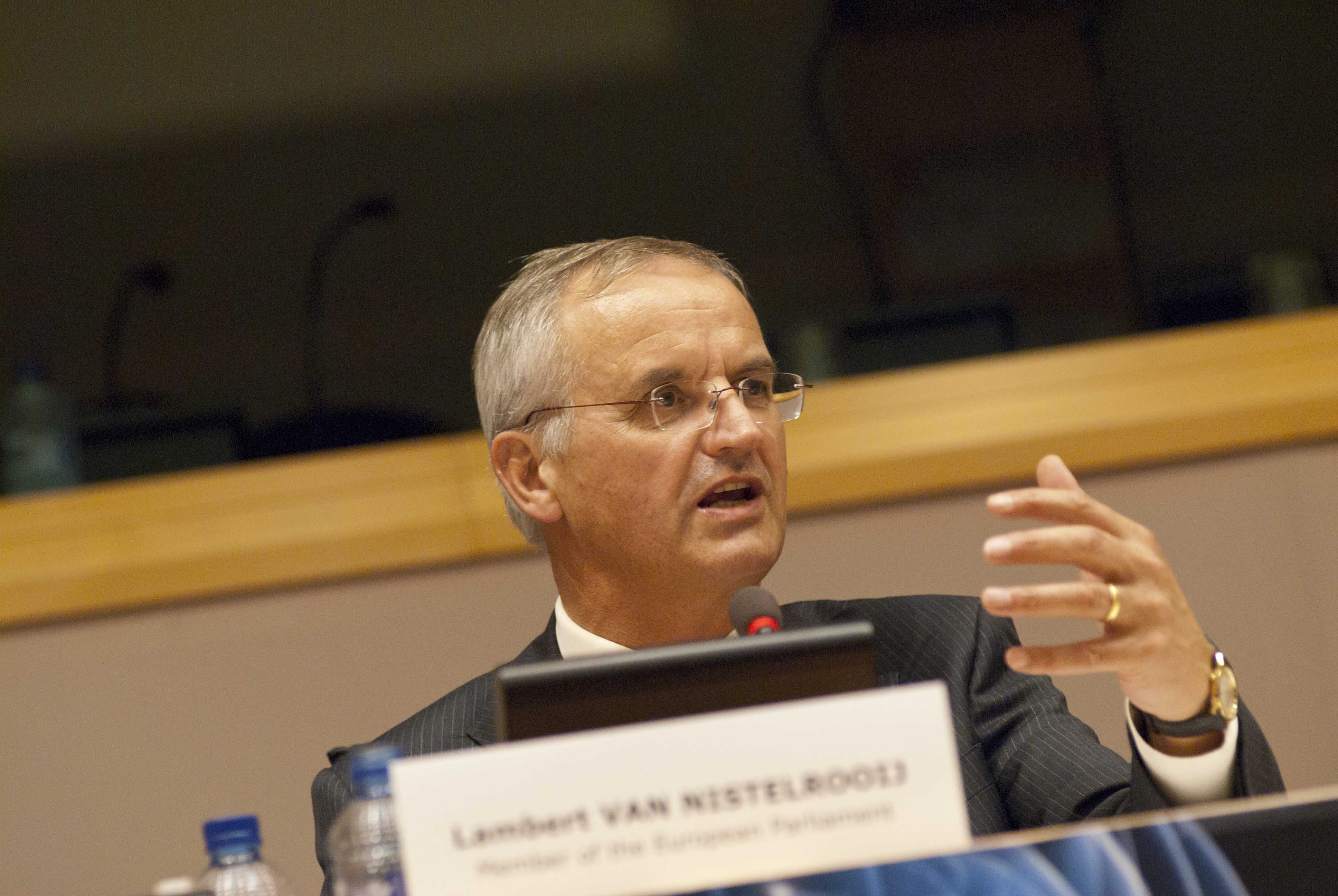 Lambertus Jacobus Jozef (Lambert) van Nistelrooij (Nuland, 5 maart 1953) is een Nederlands politicus.